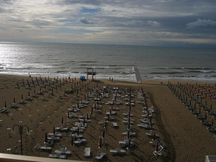 Strand von Jesolo